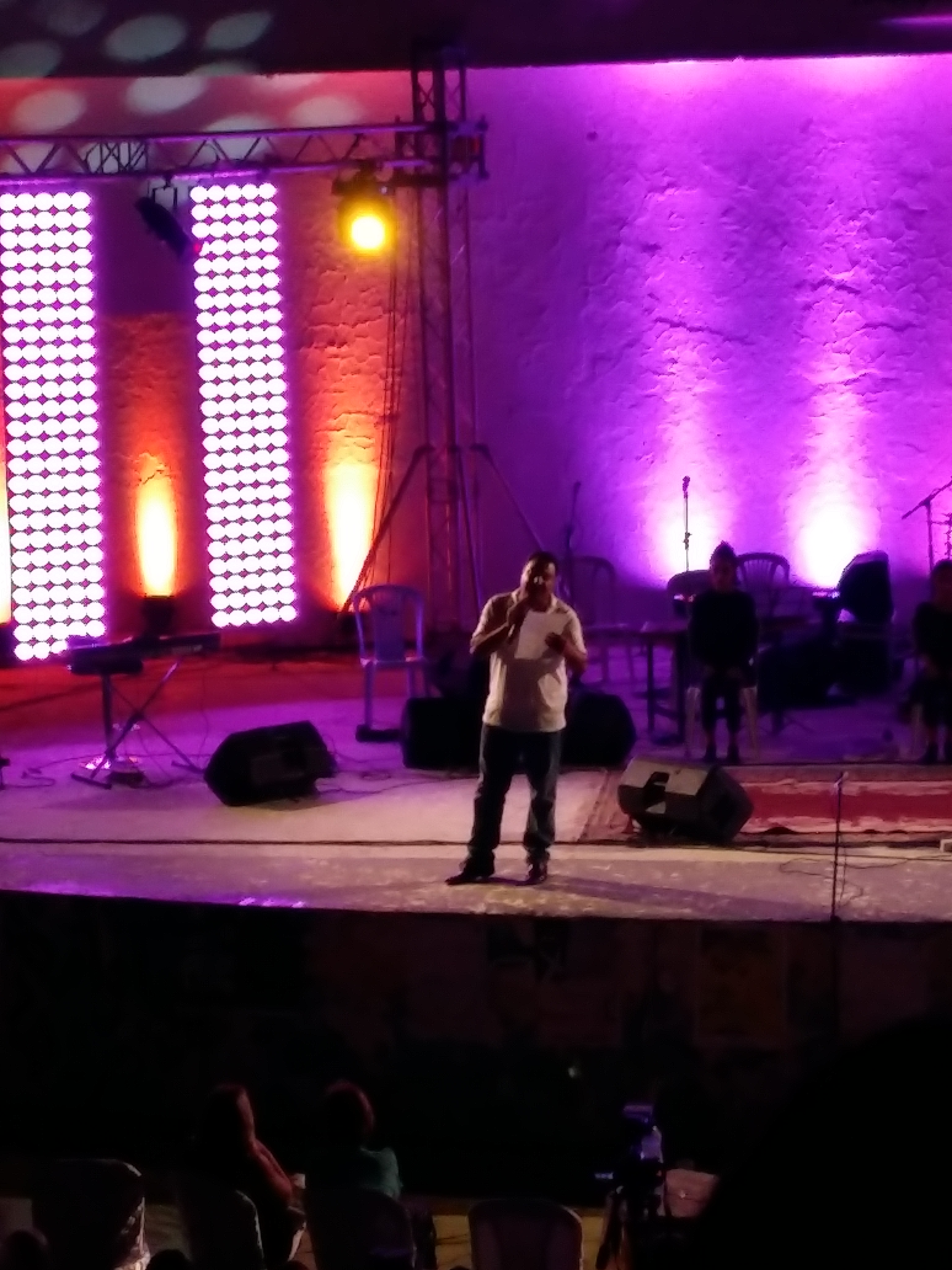 Lotfi Bondka